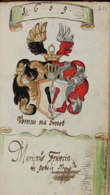 List ze šlechtického ilustrovaného památníku Jana Jiřího ze Švamberka. Fond SOkA Jindřichův Hradec, Černínský archiv, č. NAD 1286.